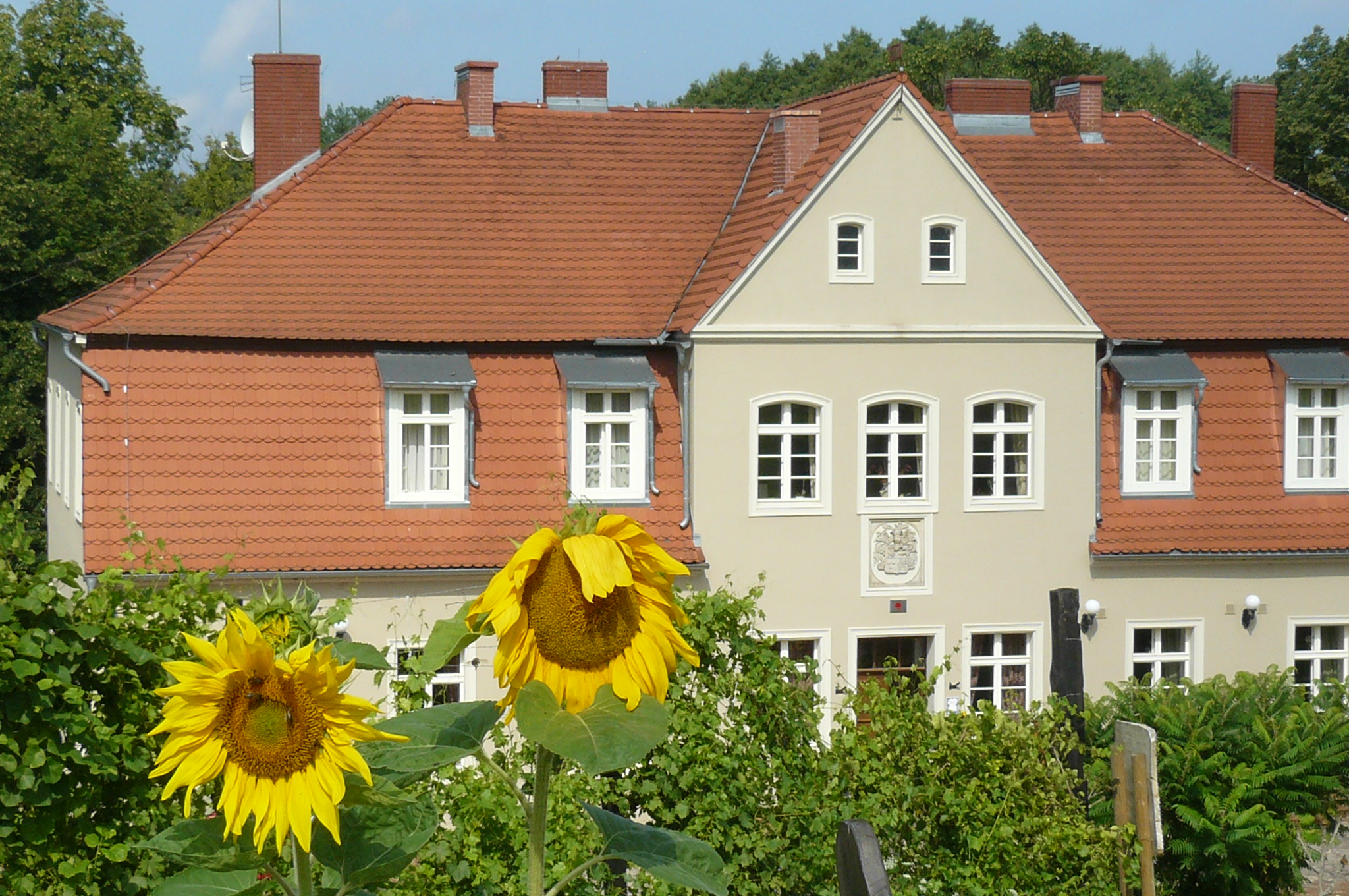 Prusim, skansen Olandia.